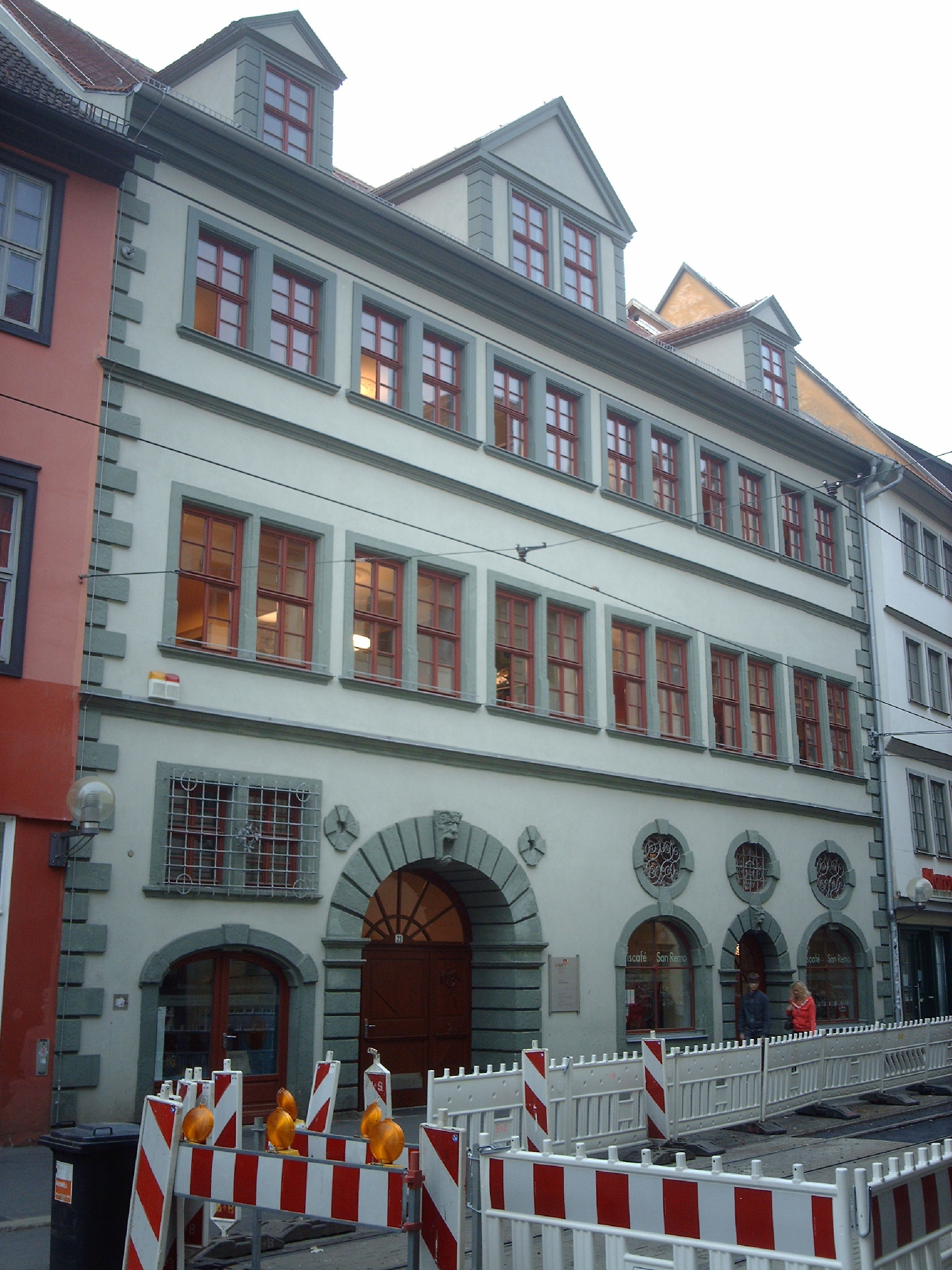 Häuser Zum Großen Pflug und Großen Siebenbürgen (Erfurt, Markststraße 21), jetzt Kinder- und Jugendbibliothek